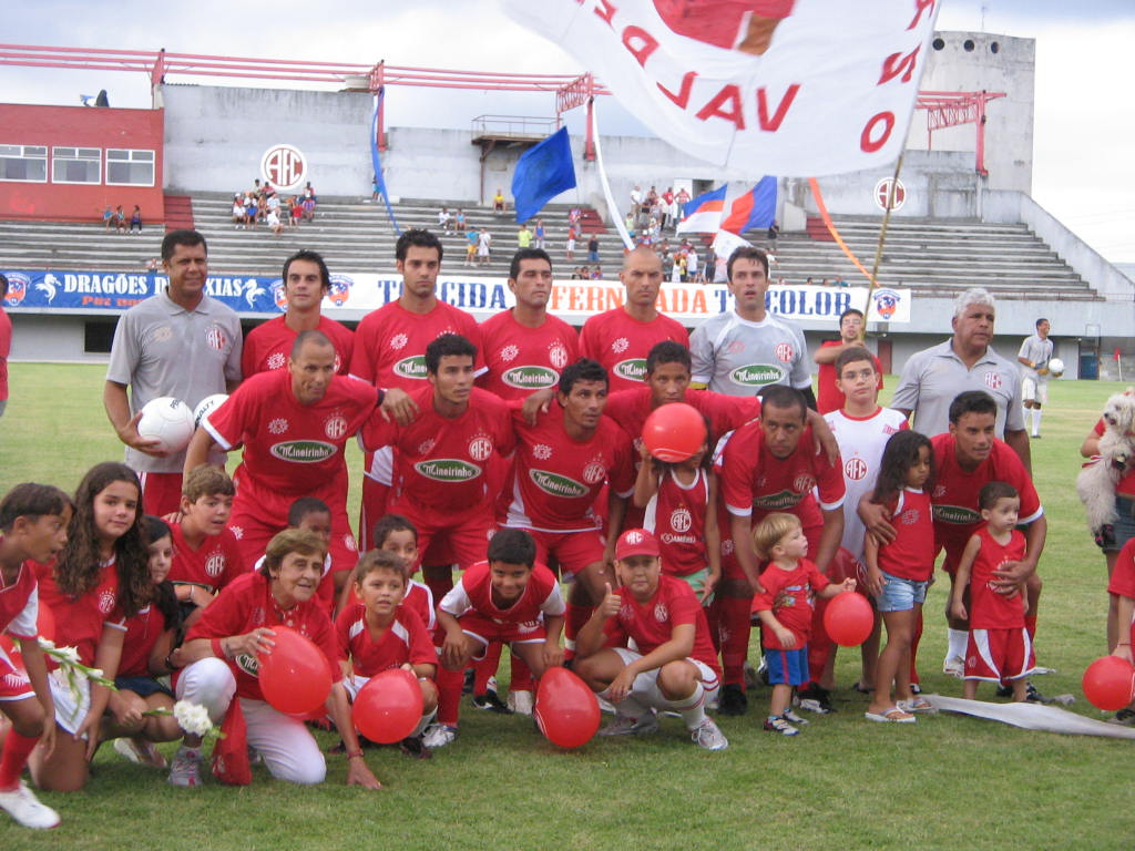 Equipe profissional do América, em 2008. Foto de Paulo Roberto Rodrigues.